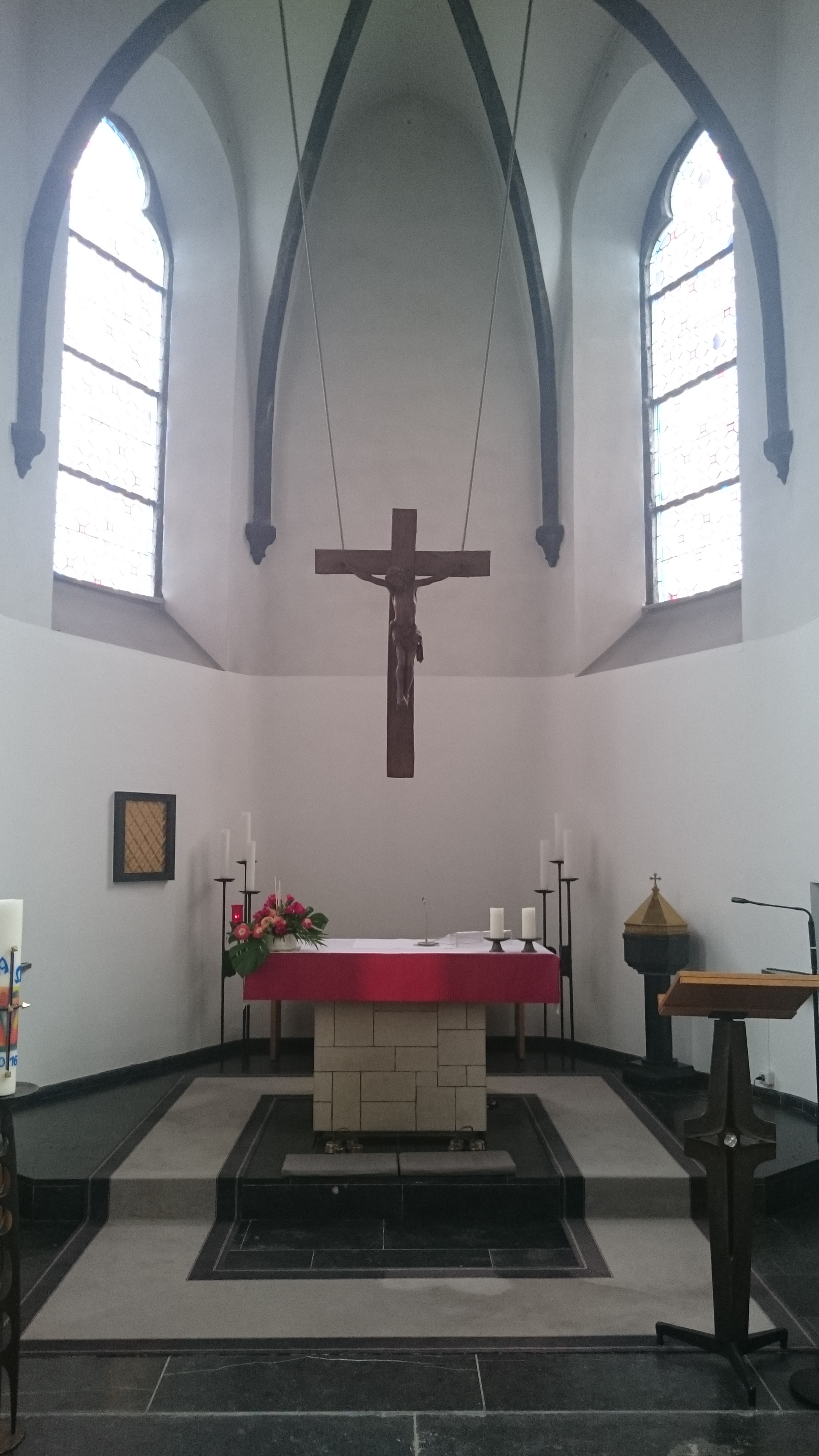 Innenraum der Kirche in Dorff